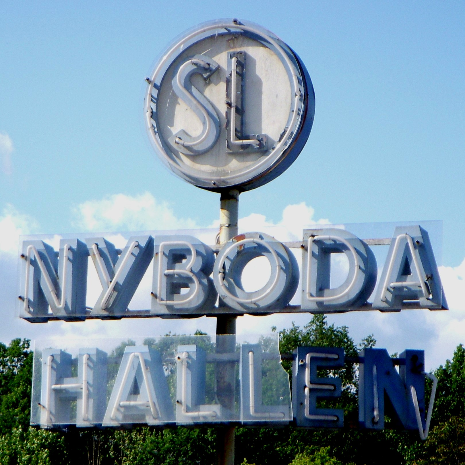 Nybodadepån, Stockholm